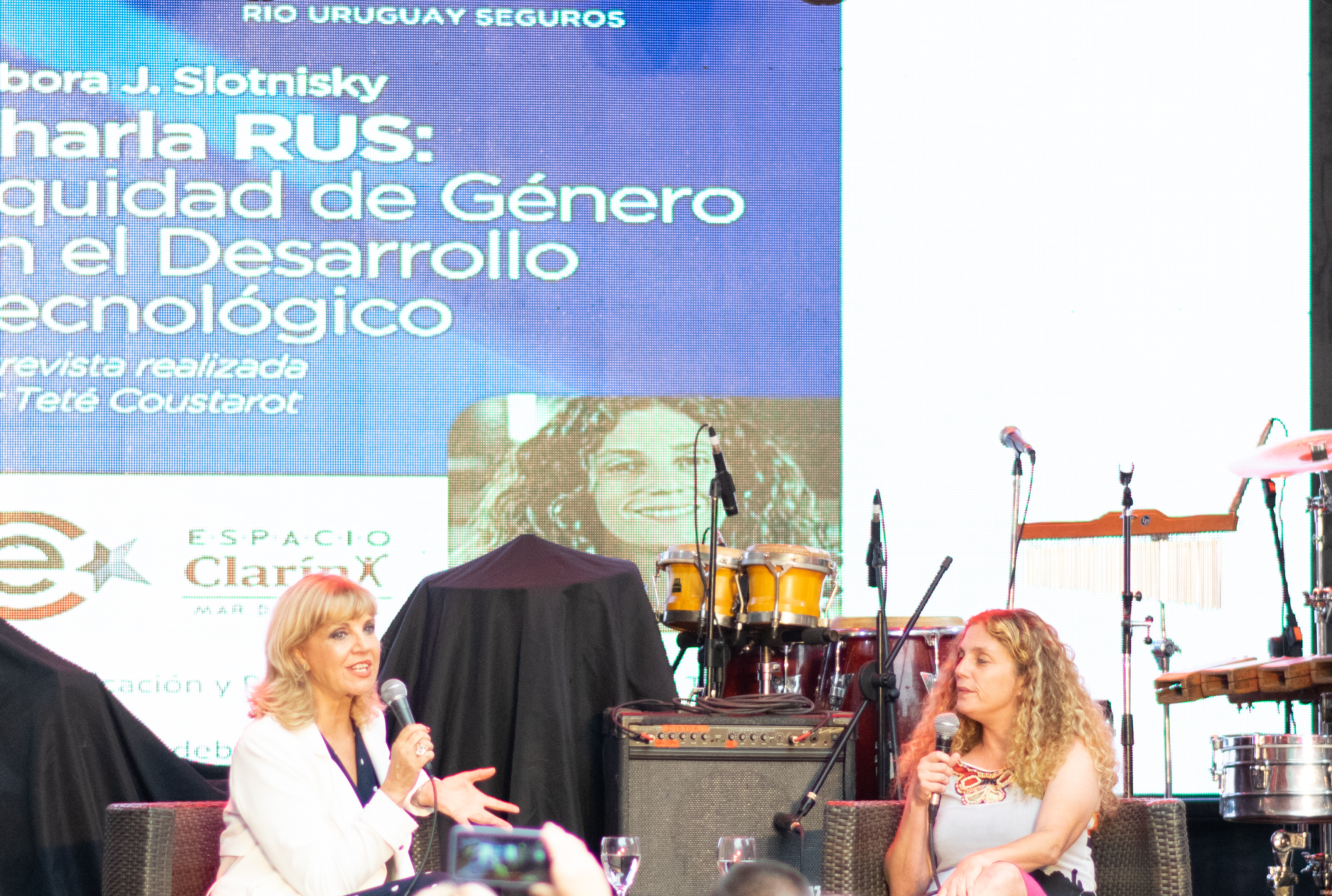 Tete Coustarot entrevistando a Debora Slotnisky en el espacio Clarín, Mar del Plata, Argentina